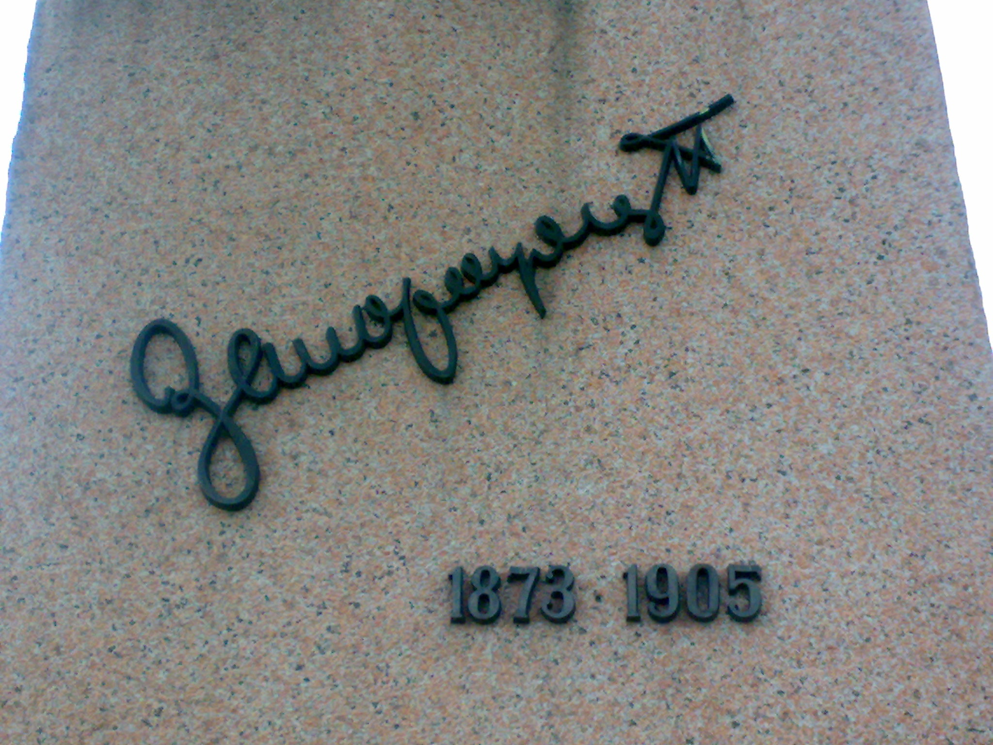 Напис на пам'ятнику Петру Запорожцю у Білій Церкві